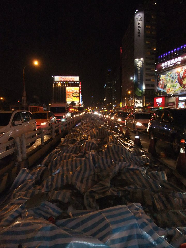 中文（台灣）: 拆除中的臺北市忠孝西路公車專用道